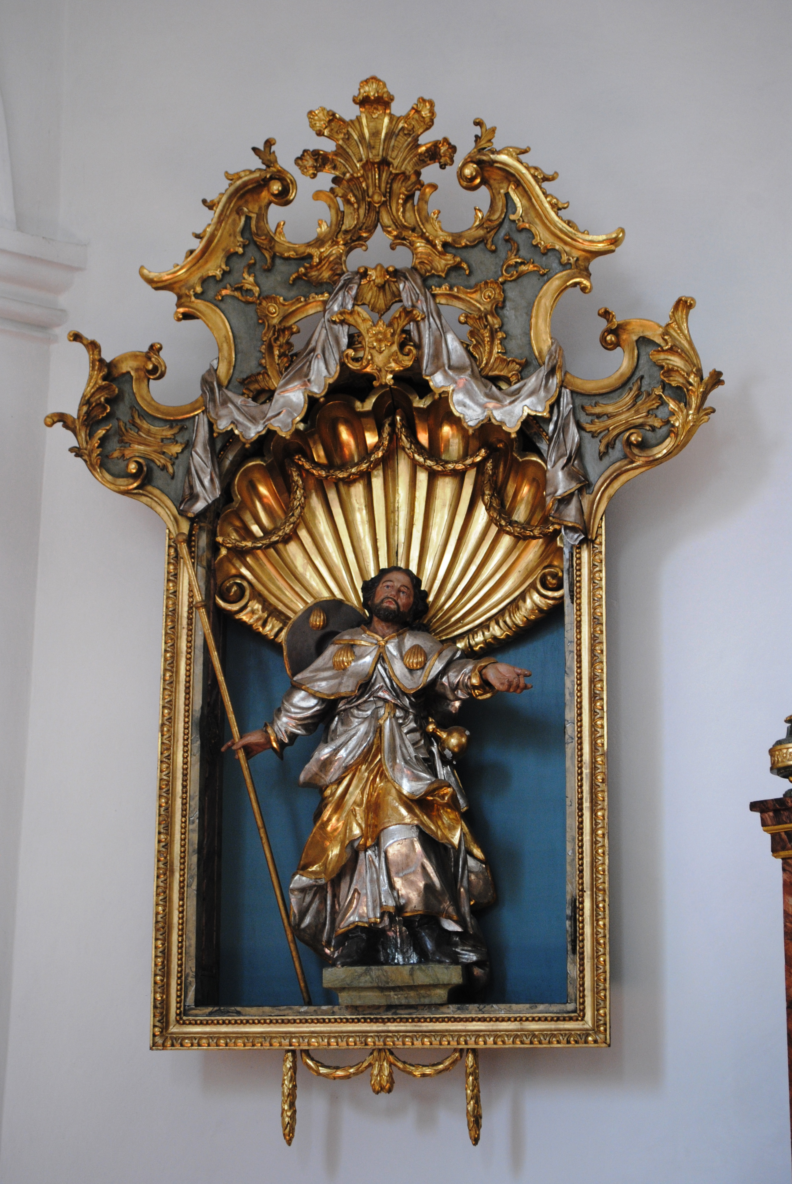 Heiligenfigur, Jakobus der Ältere, Kirche, EffeldorfThis is a photograph of an architectural monument.